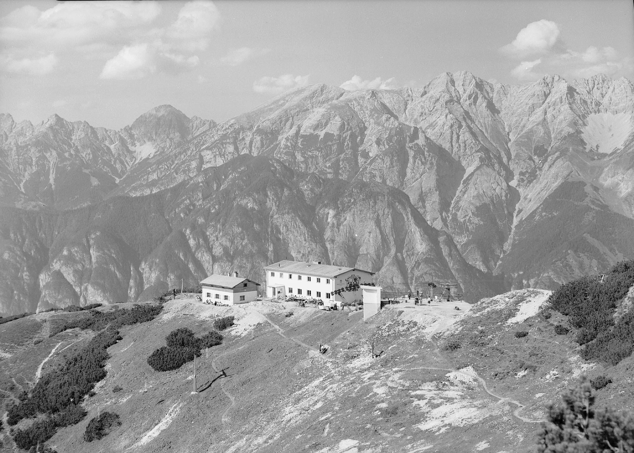 [Birgitzköpflhütte gegen Erlspitze und Solstein / Tirol]